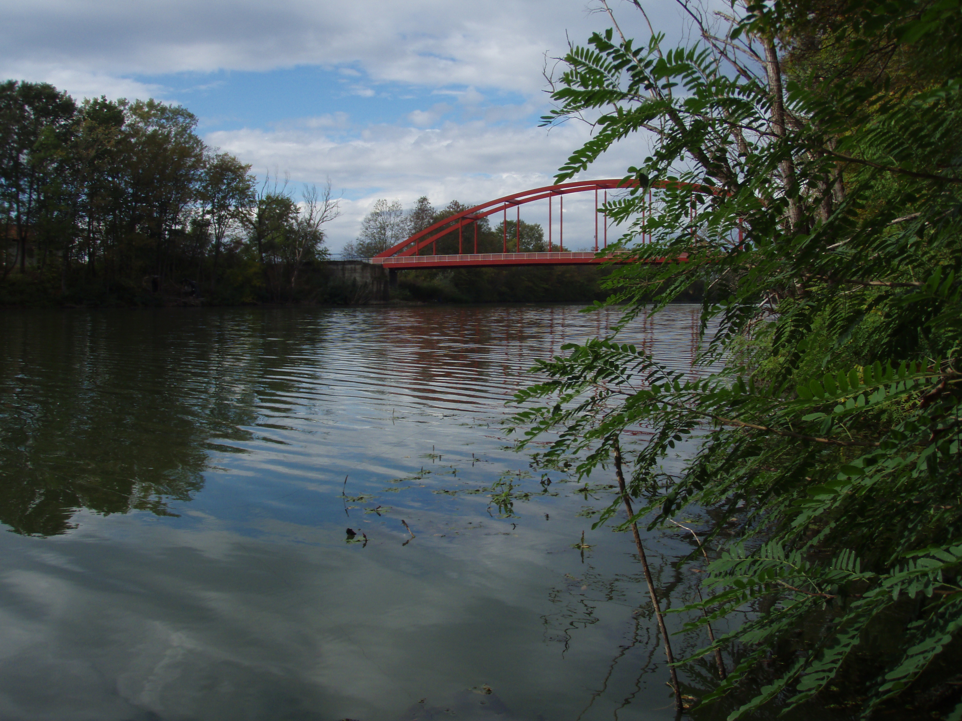 Rijeka Spačva